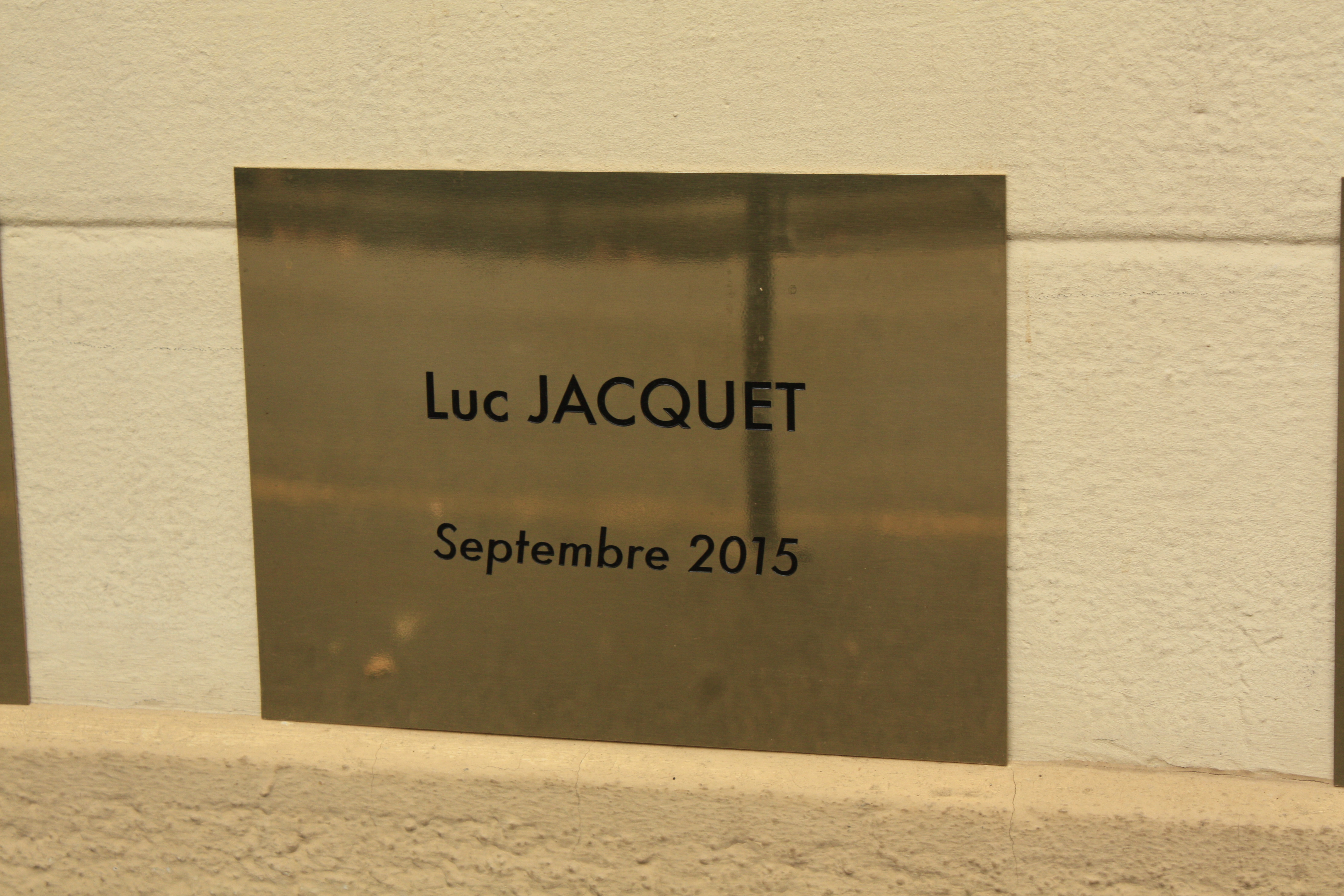 Plaque honorant Luc Jacquet sur le mur des cinéastes de l'Institut Lumière, à Lyon. Posée en septembre 2015.